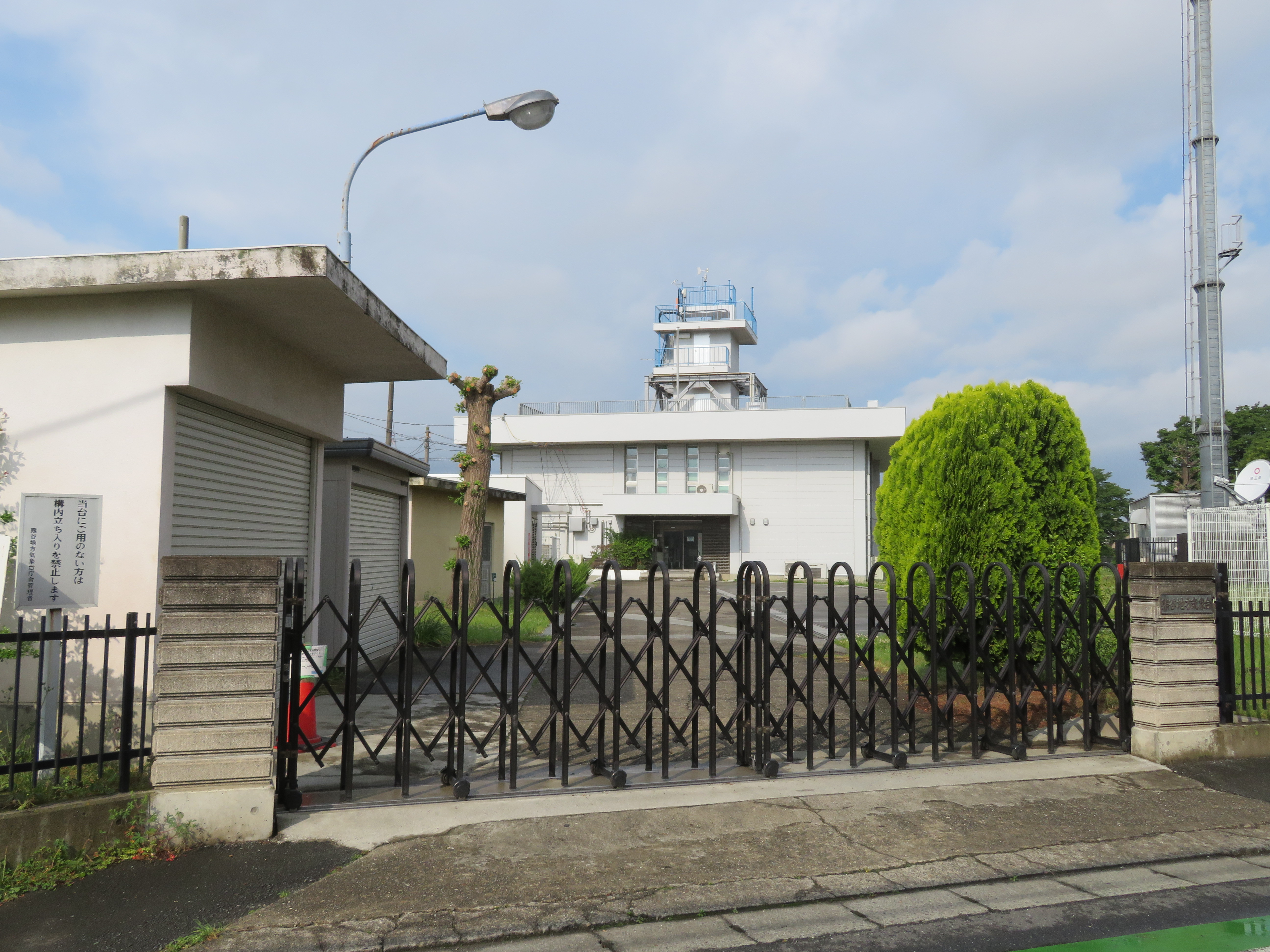 熊谷地方気象台 Canon PowerShot SX720 HS